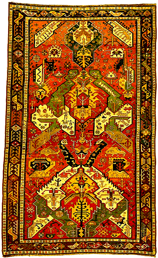 Metropoliten muzeyində 1800-cü illərə aid Quba xalçası